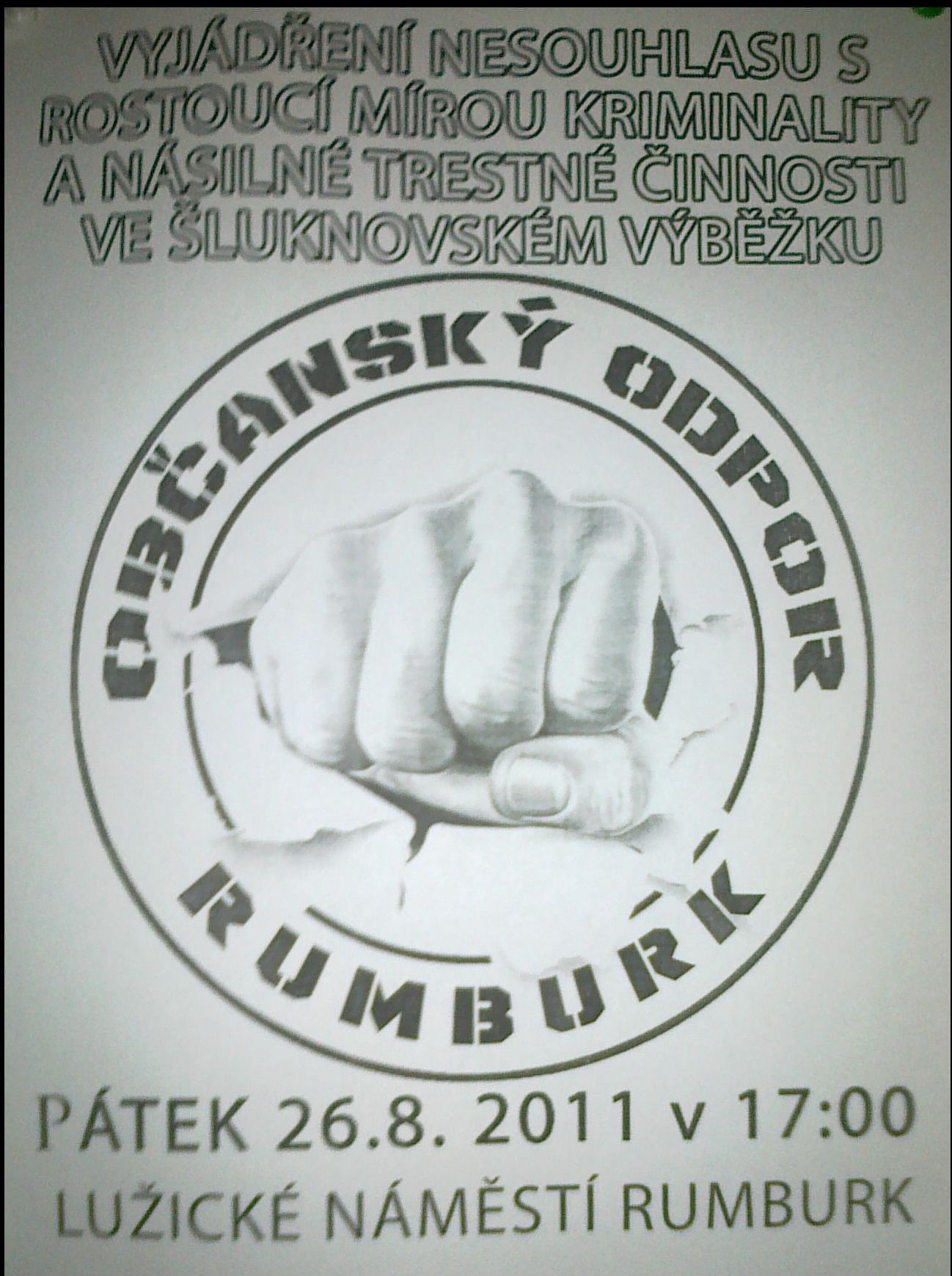 Leták který oznamuje demonstrace dne 26. září 2011 v Rumburku